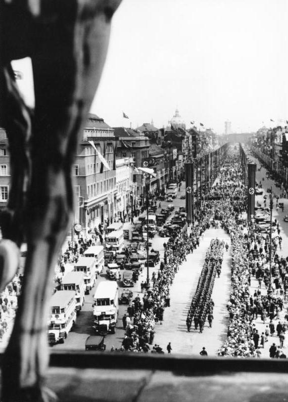 Berlin Olympiade 1936 - Unter den Linden Die Wache zieht auf